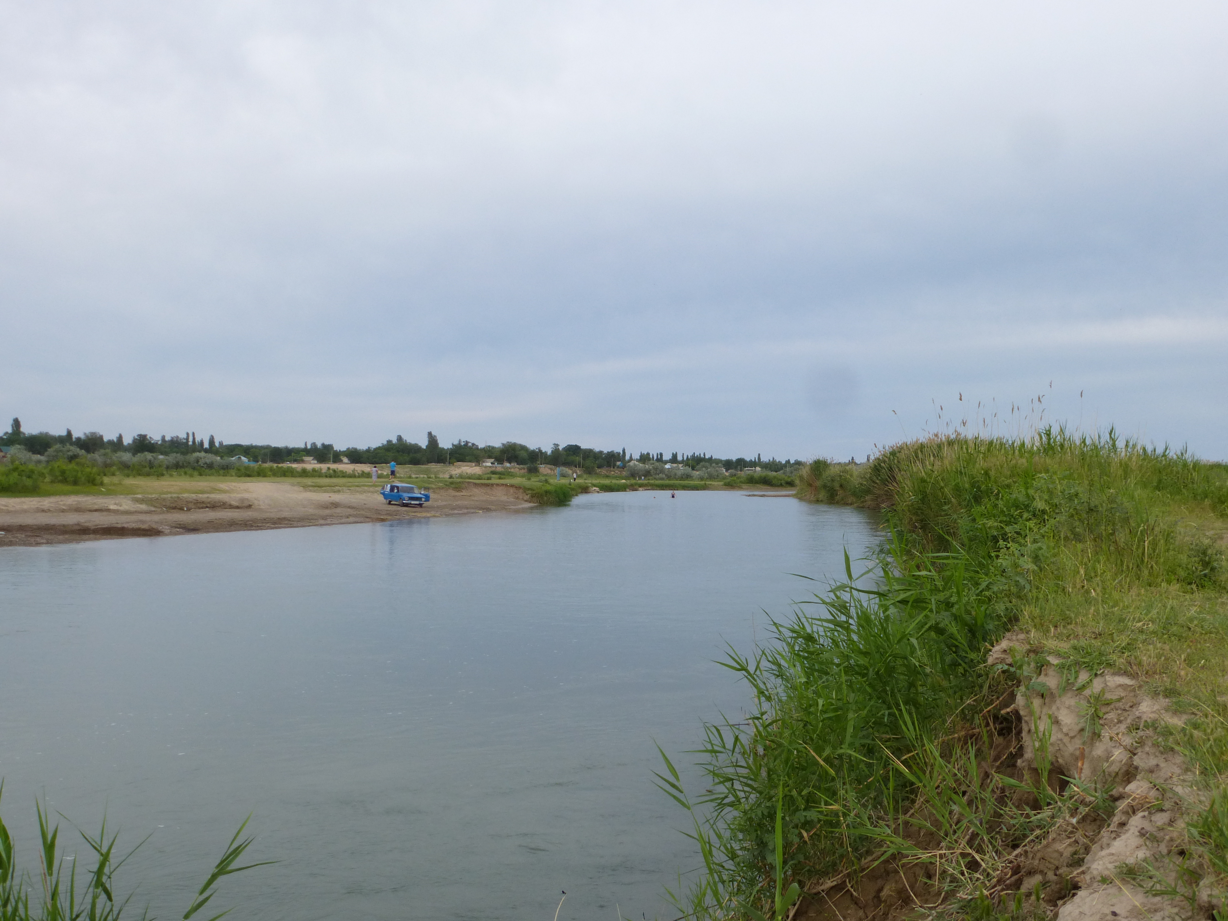 Река Шу возле посёлка Кайнар (бывш. Благовещенка). Координаты съёмки 43°17'36.65"С - 74°10'28.00"В